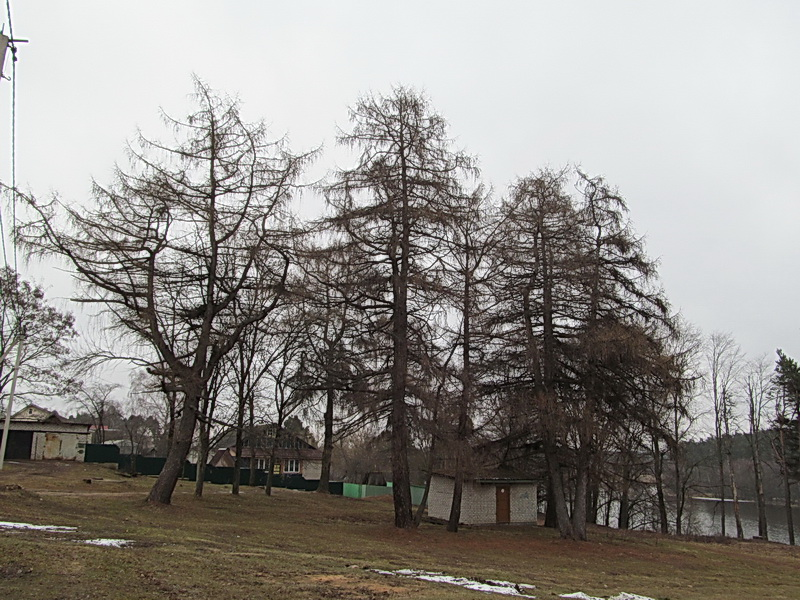 Крупкі. Сядзіба